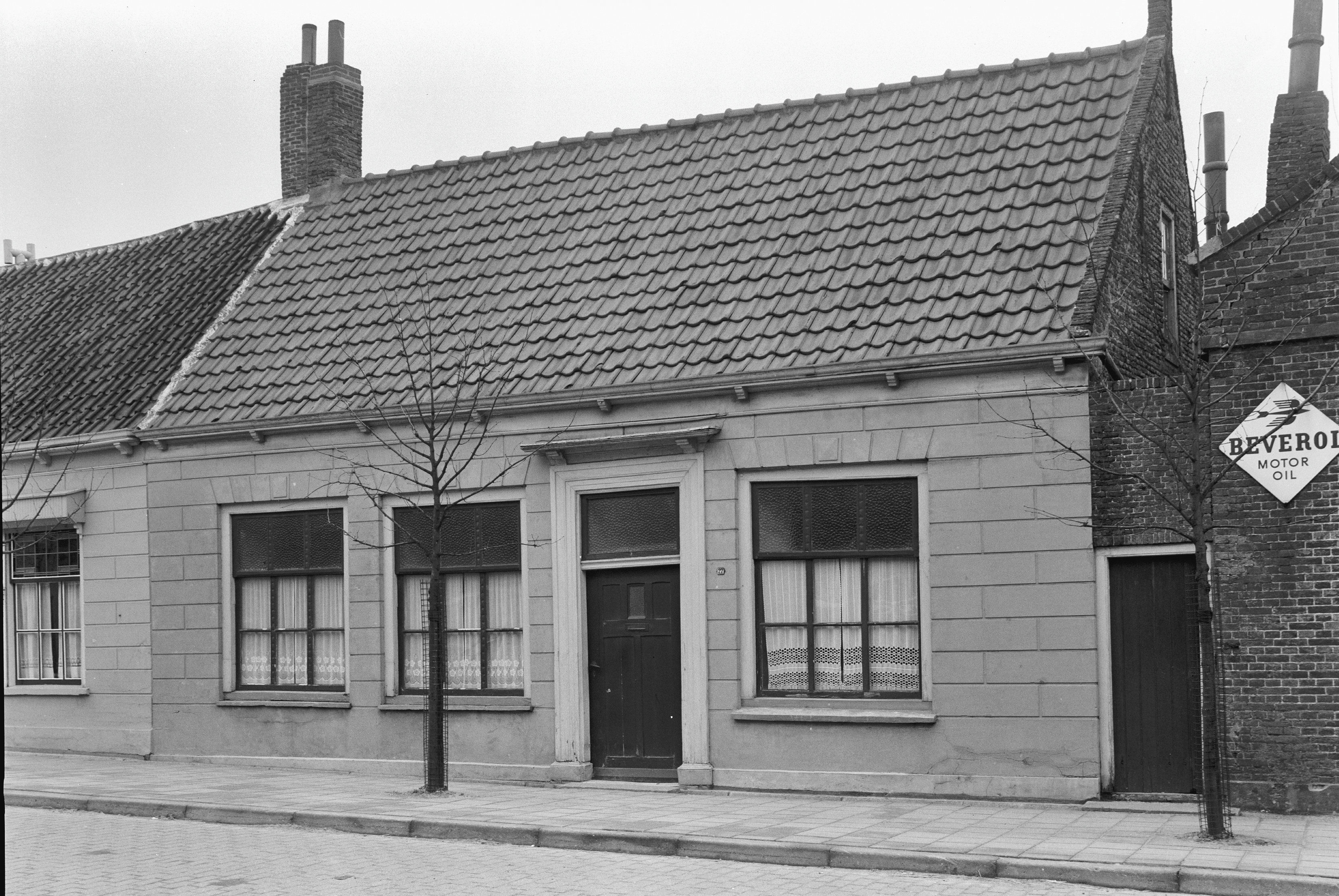 Oudestraat